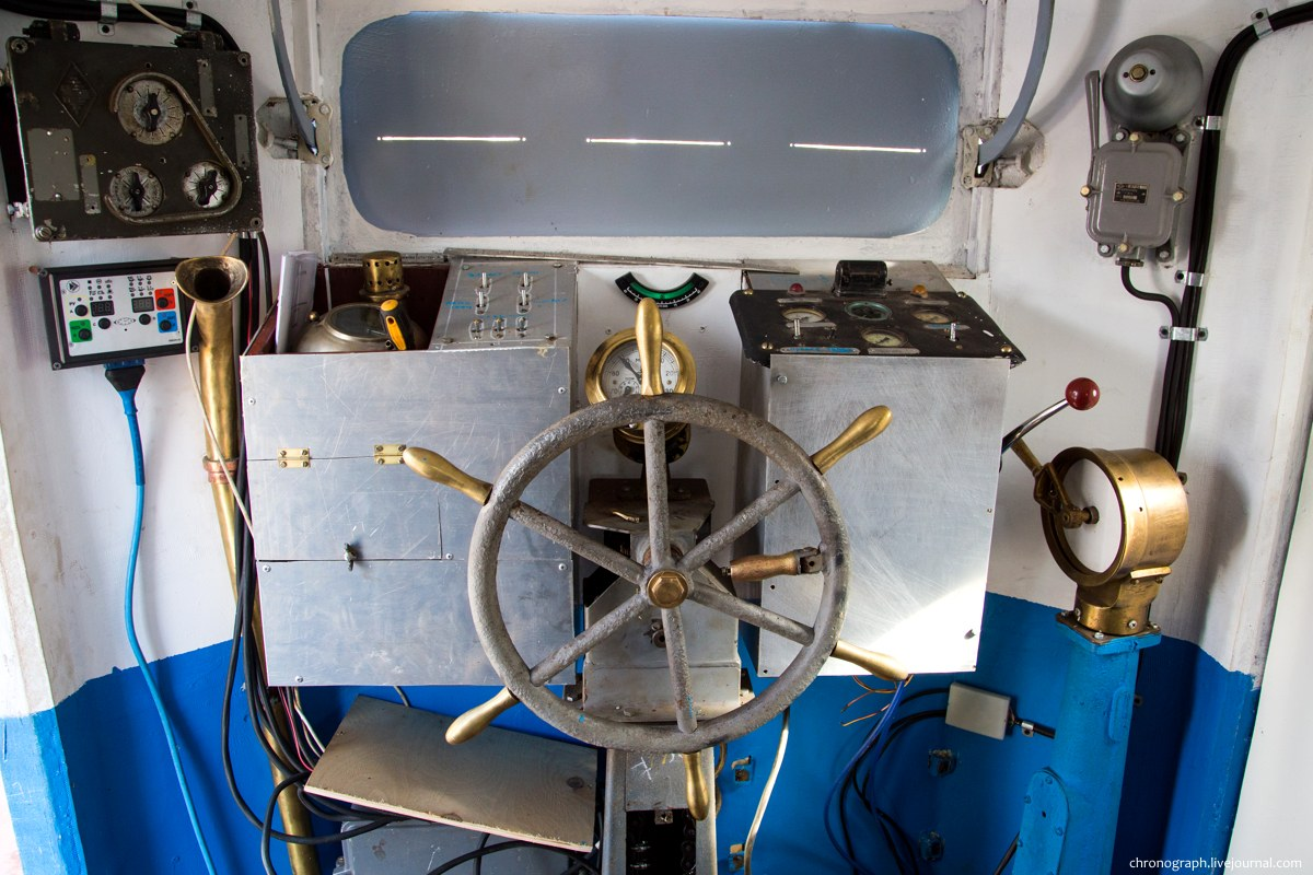 Копия бронекатера БК-73 проекта 1125 времён Великой Отечественной войны. Строительство бронекатера велось на Тольяттинском судоремонтном заводе. Многие использованные детали оригинальные